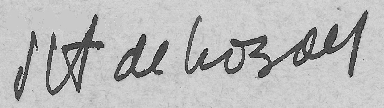 Signature Jean Vincent de Crozals 1968